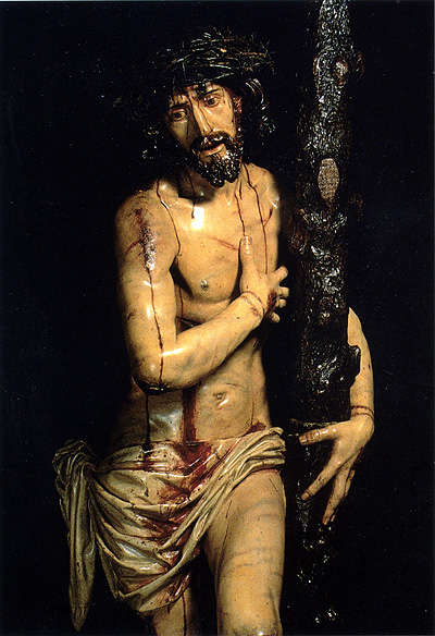 Cristo de la Victoria. Serradilla, provincia de Cáceres. Extremadura, España.